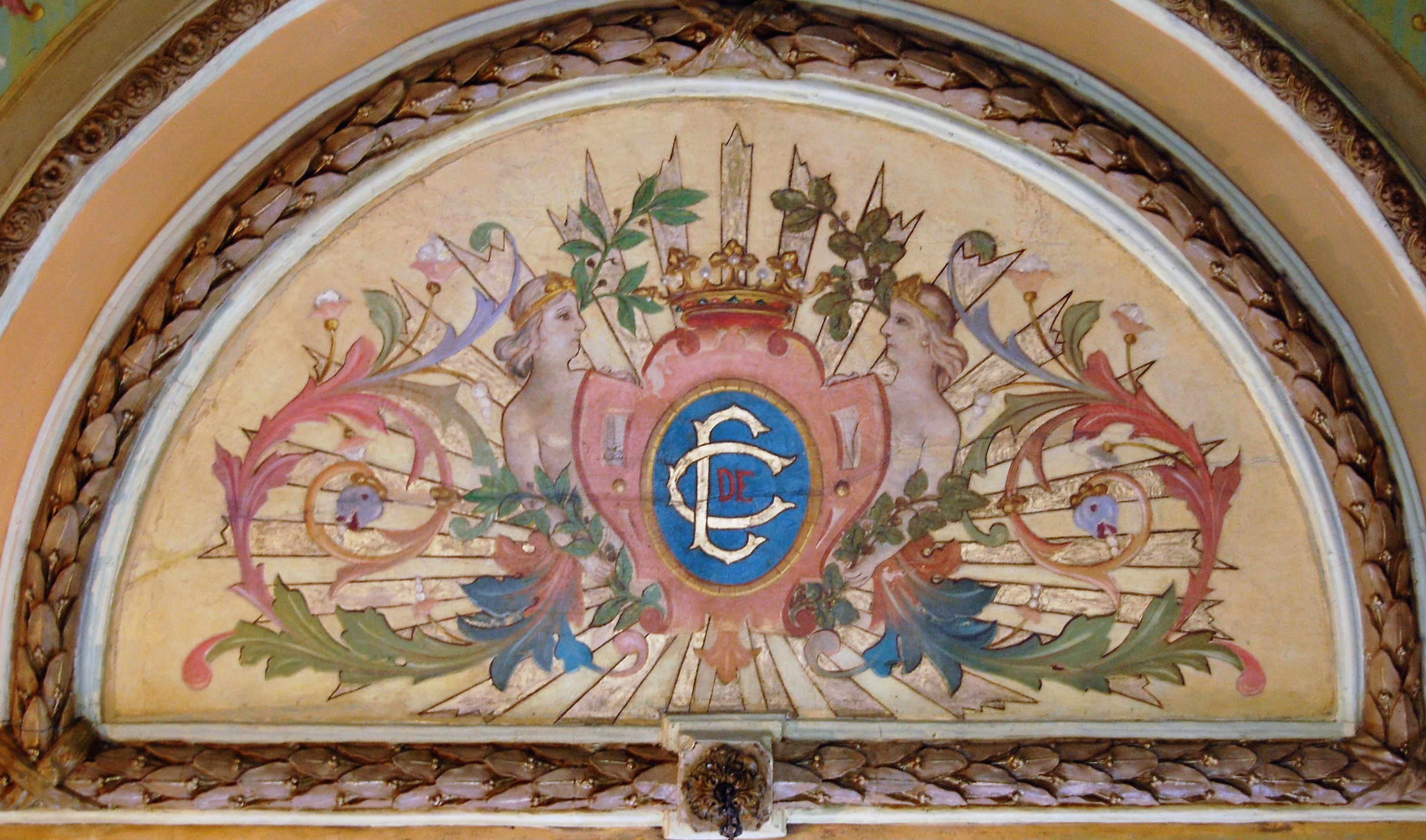 Logotipo artístico del Círculo de Contribuyentes en Alcalá de Henares (Comunidad de Madrid - España). Pintado por Samuel Luna López en 1907.